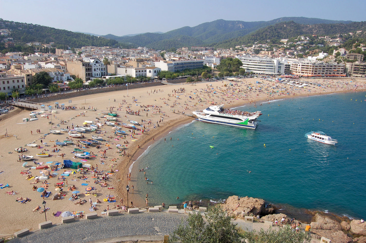 Tossa de Mar (Catalogne, Espagne)